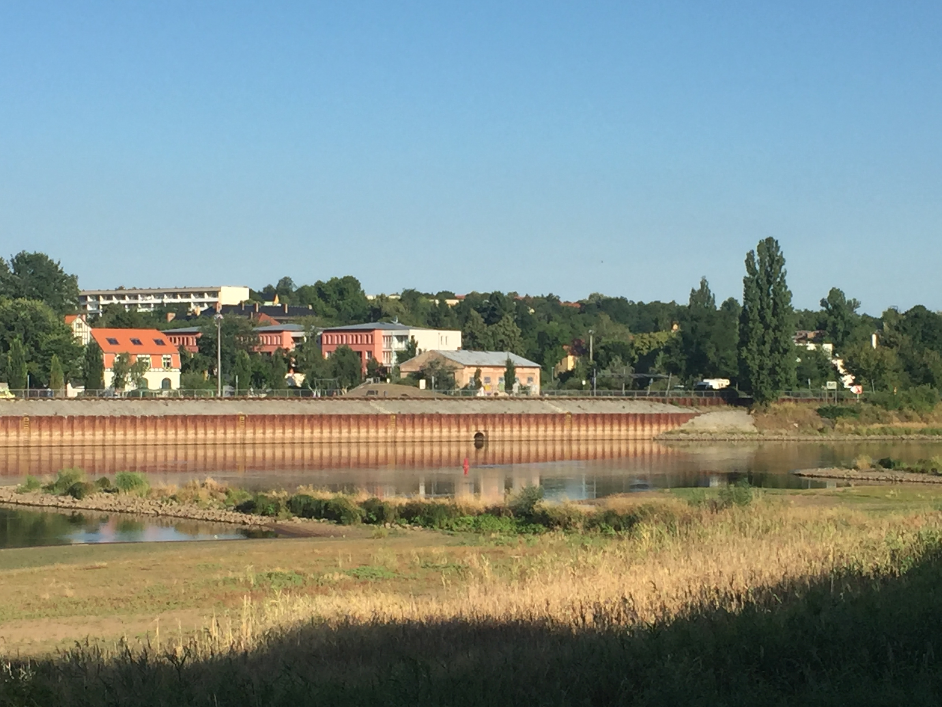 Klingemündung Frankfurt (Oder) 2018